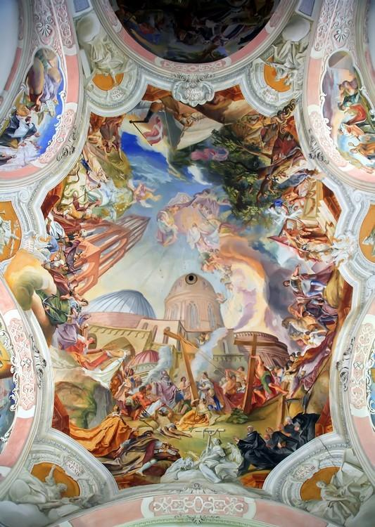 Legnickie Pole